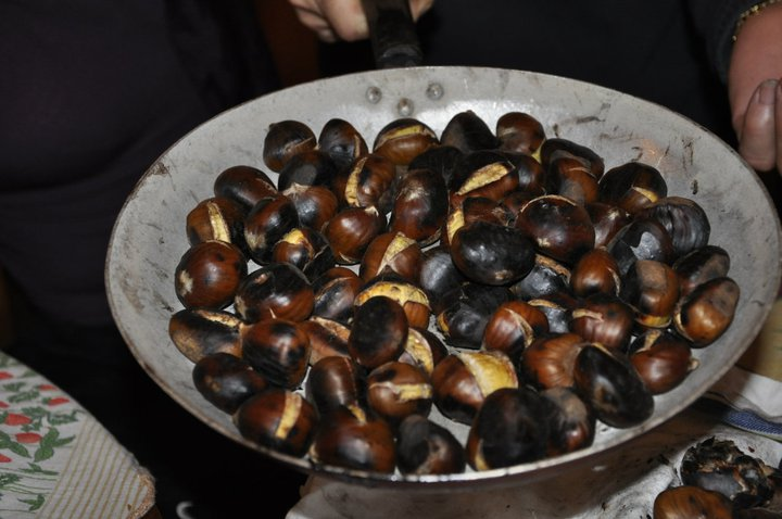 Caldarroste